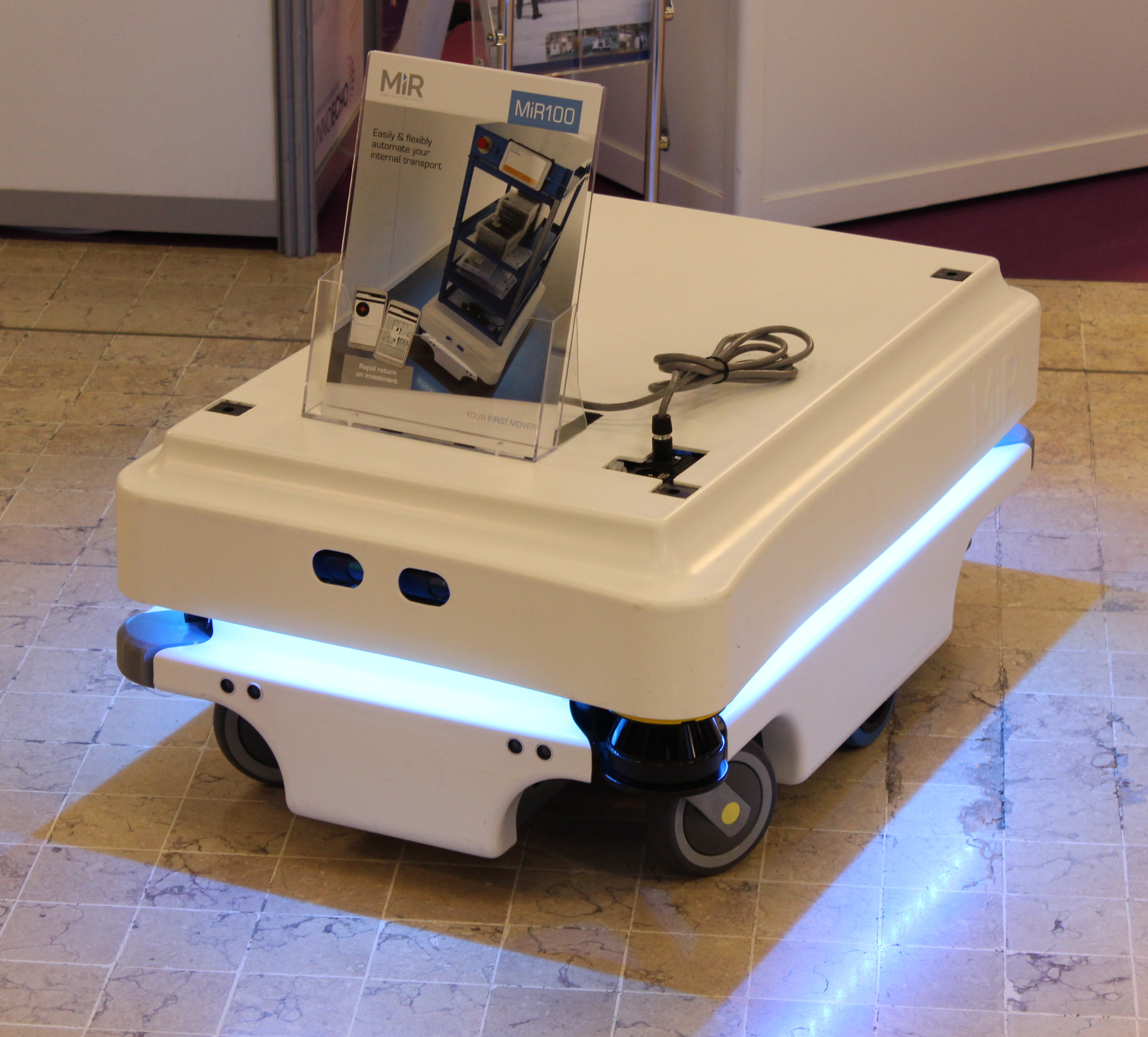 Le robot MiR100 de l'entreprise Mobile Industrial Robots au salon Innorobo à Lyon en 2015.